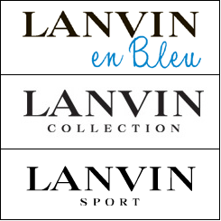 LANVIN licensed brands, exvclusive to japanese market